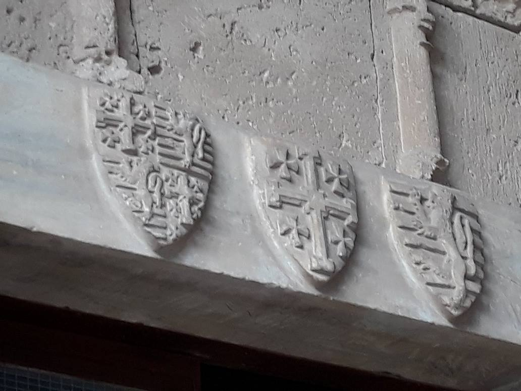 Blasons des rois de Jerusalem, des Lusignan, des Lusignan de Chypre.